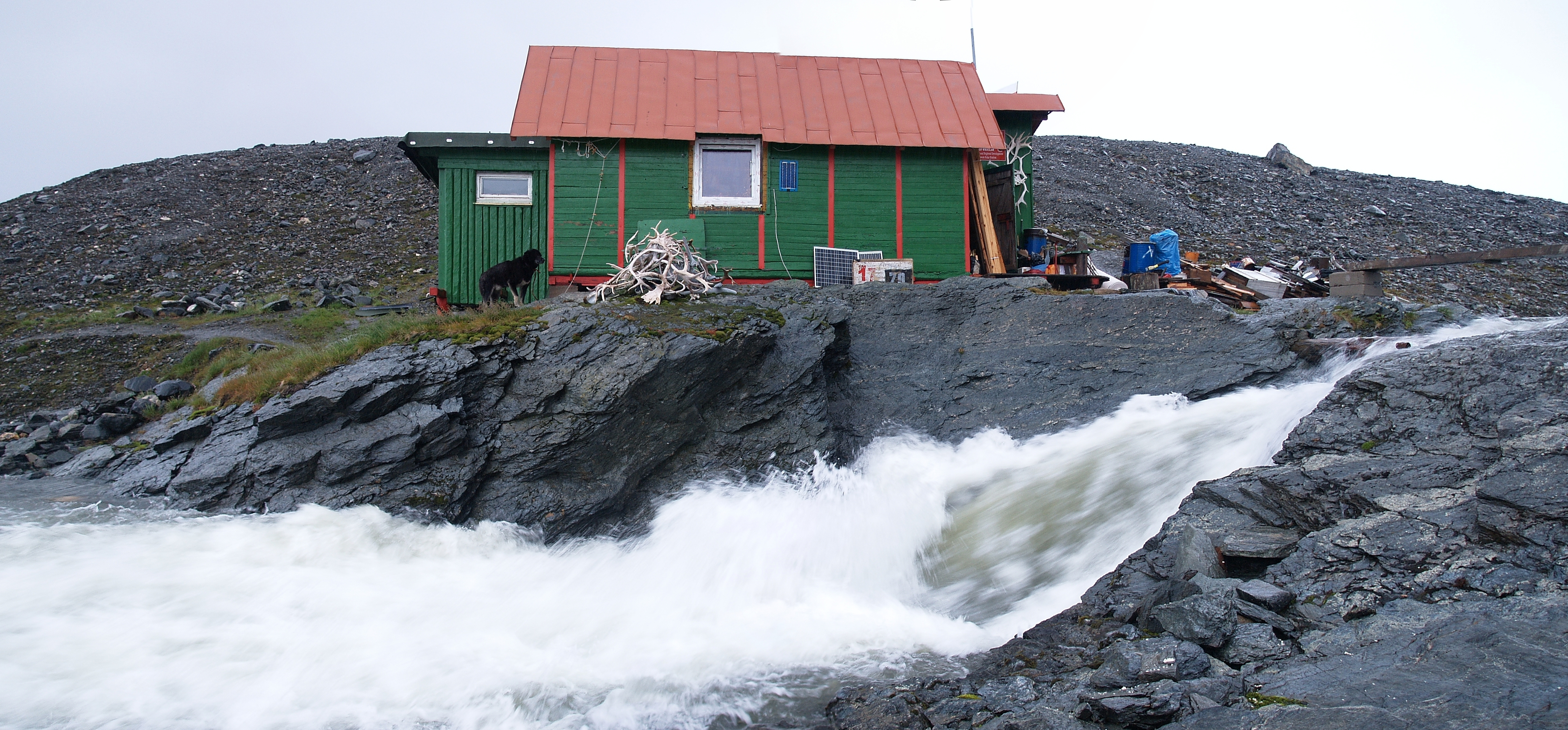 Wezbrane wody Bratteggi przekraczają próg skalny przy Baranówce